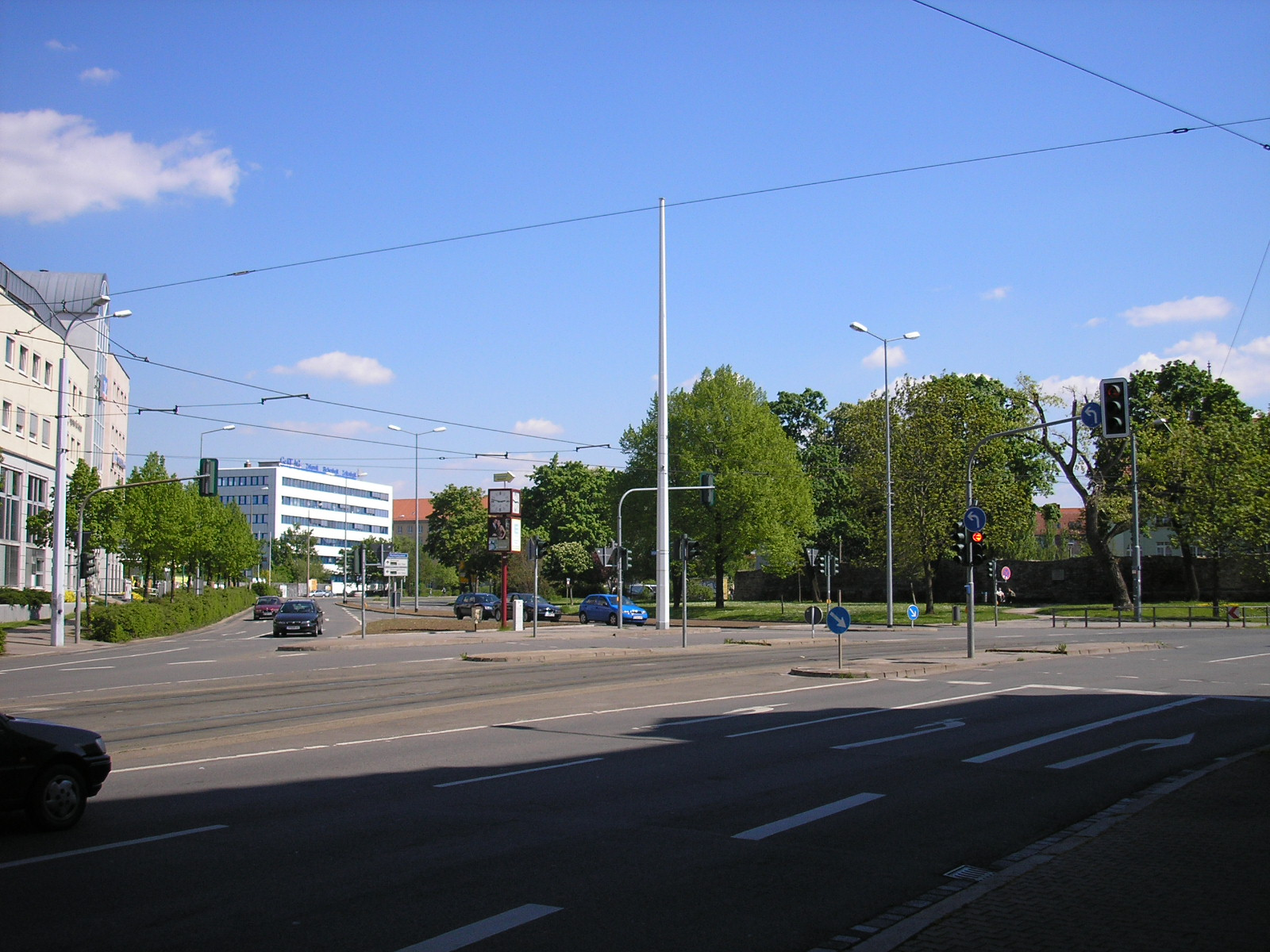 Das innere Johannestor, Beginn des Juri-Gagarin-Rings in Erfurt (Thüringen).